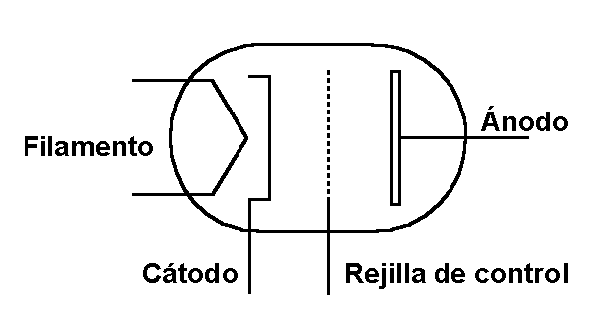 Símbolo del triodo